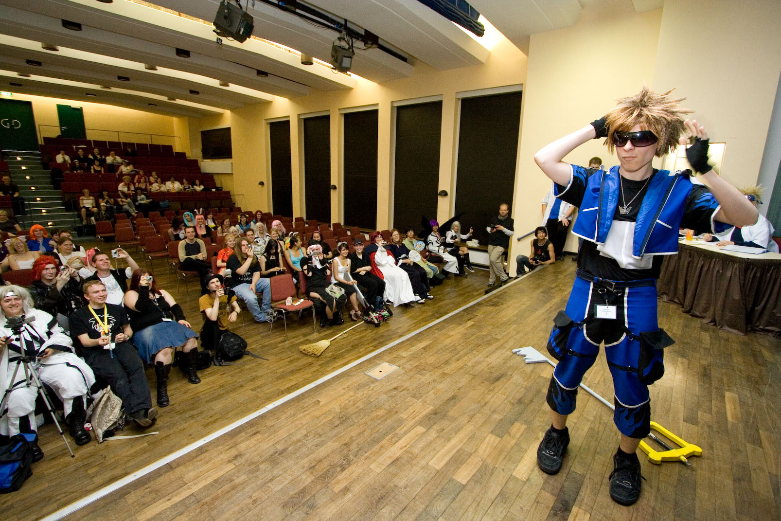 Cosplayer auf der Bühne beim Vorentscheid der deutschen Cosplaymeisterschaft im Haus der Jugend, Frankfurt (Main)